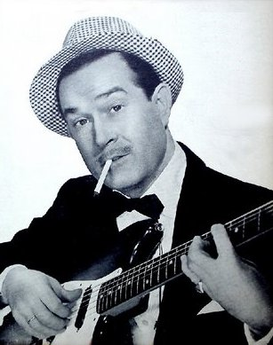 Gogó Andreu. Actor. Argentina.